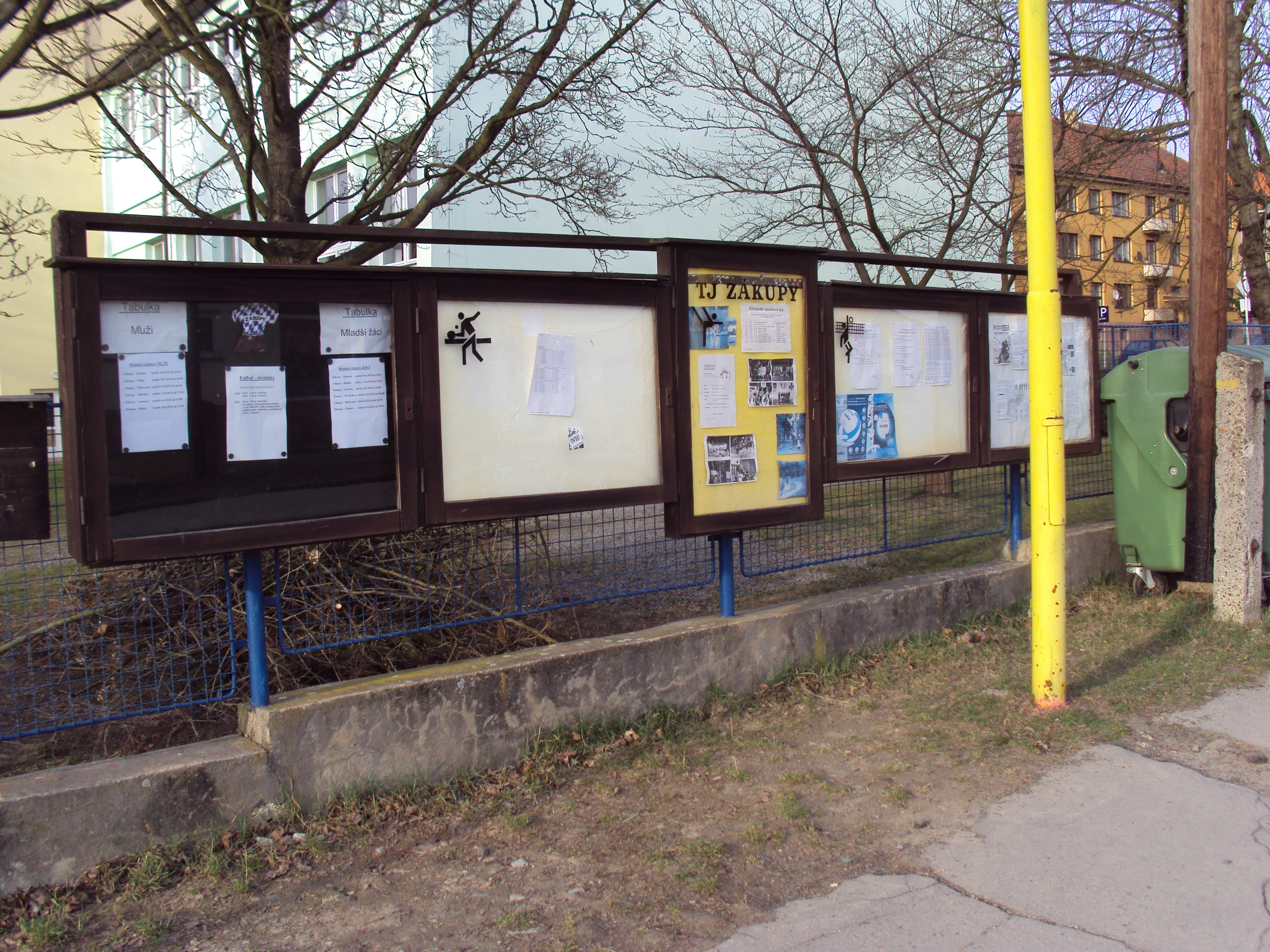 Vývěsky TJ Zákupy jsou poblíž jejich hřiště a školy